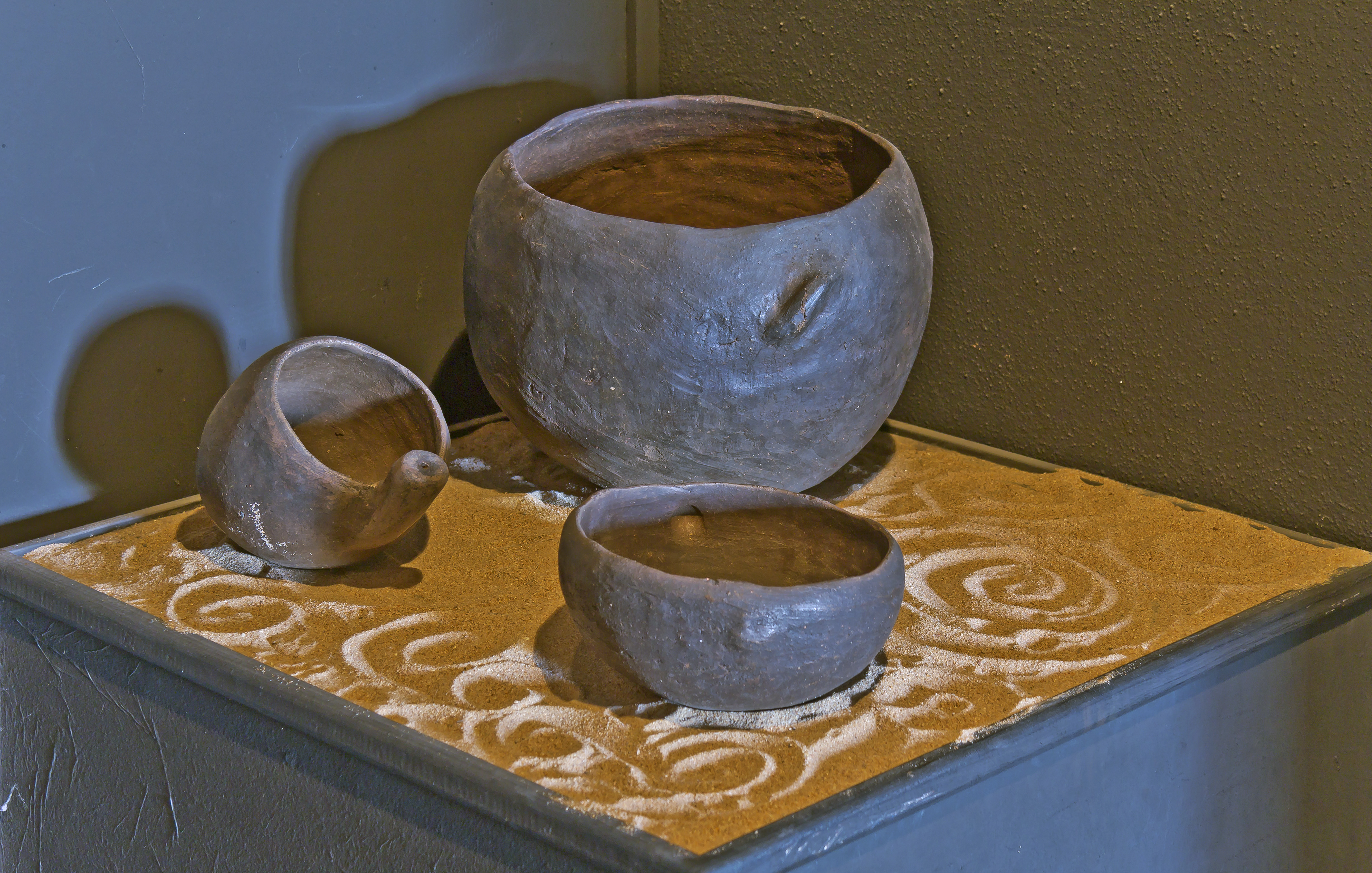 Museo Arqueológico del Puerto de La Cruz, Saal 2 Tonkrüge